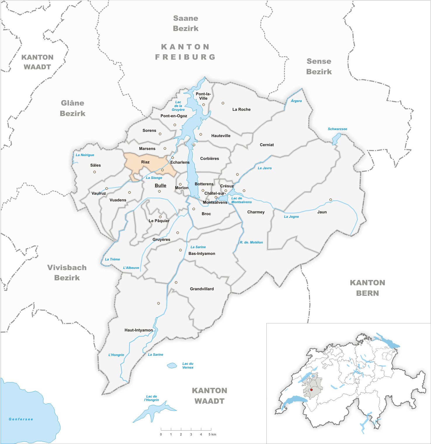 Municipality Riaz